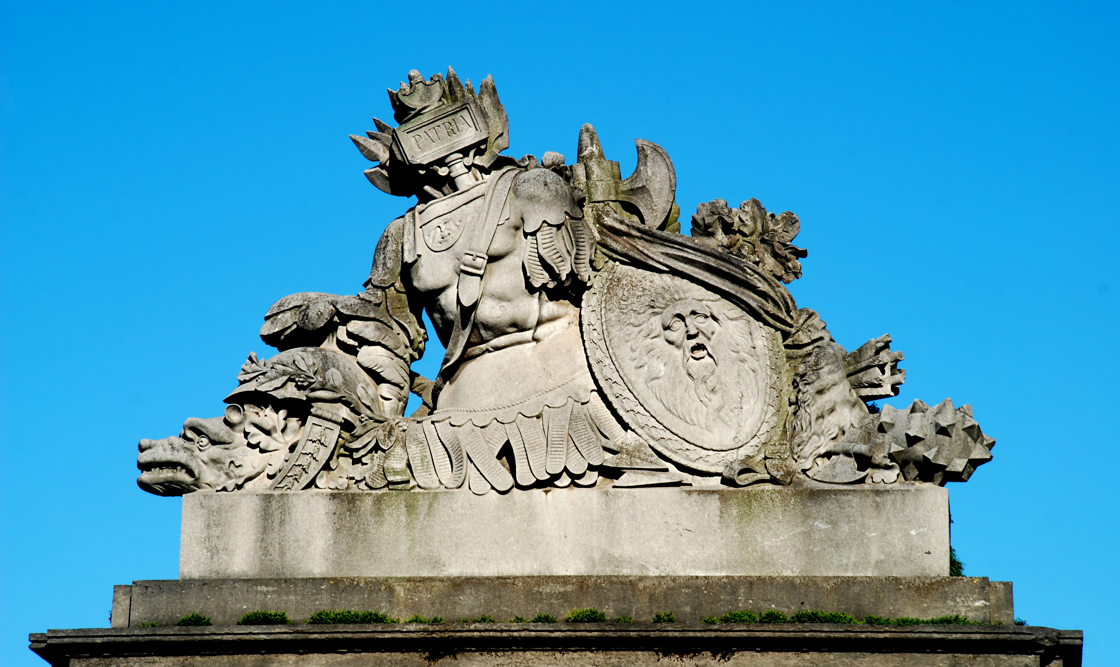 Belgique - Bruxelles - Sculpture du mur de clôture entre Hôtel Errera et Hôtel de Grimbergen